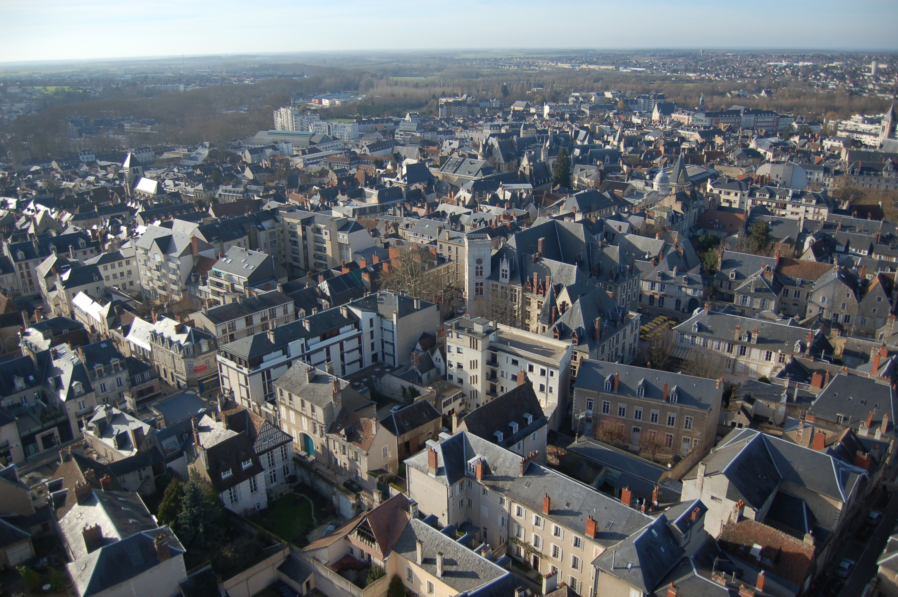 Bourges vue depuis la tour nord de la cathédrale